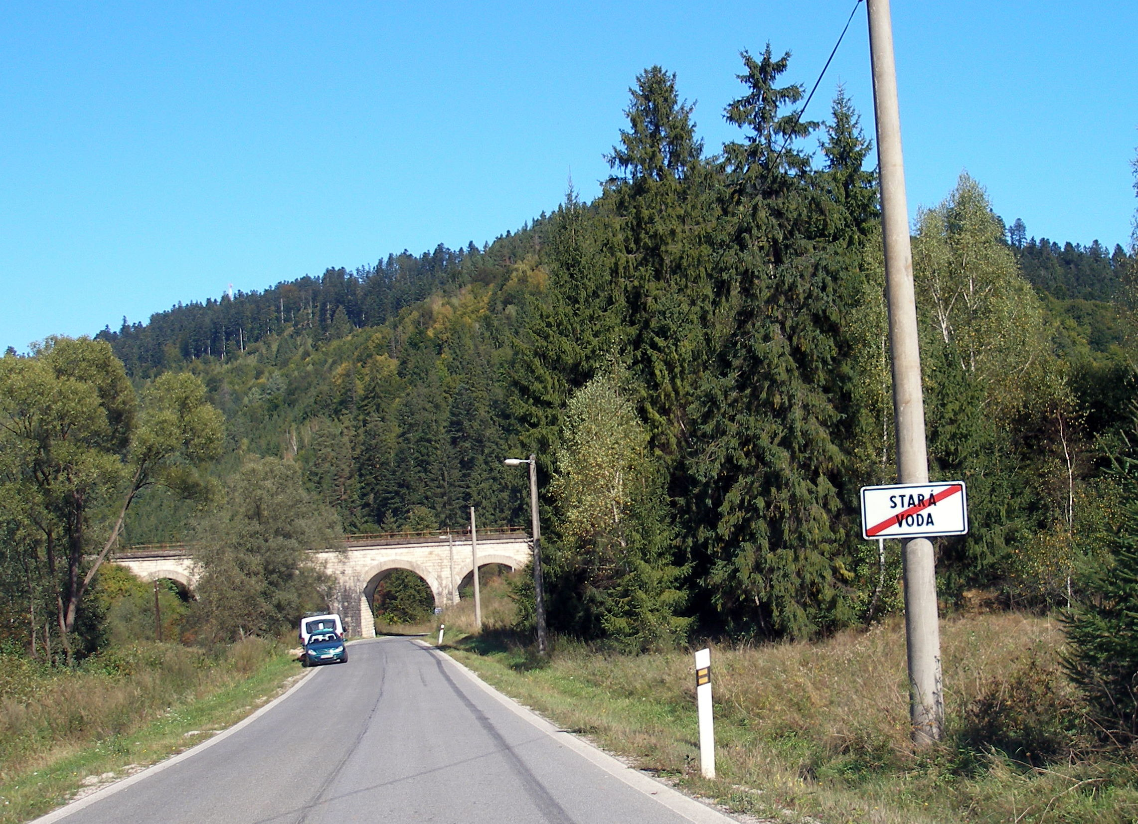 Spišská obec Stará Voda okres Gelnica.